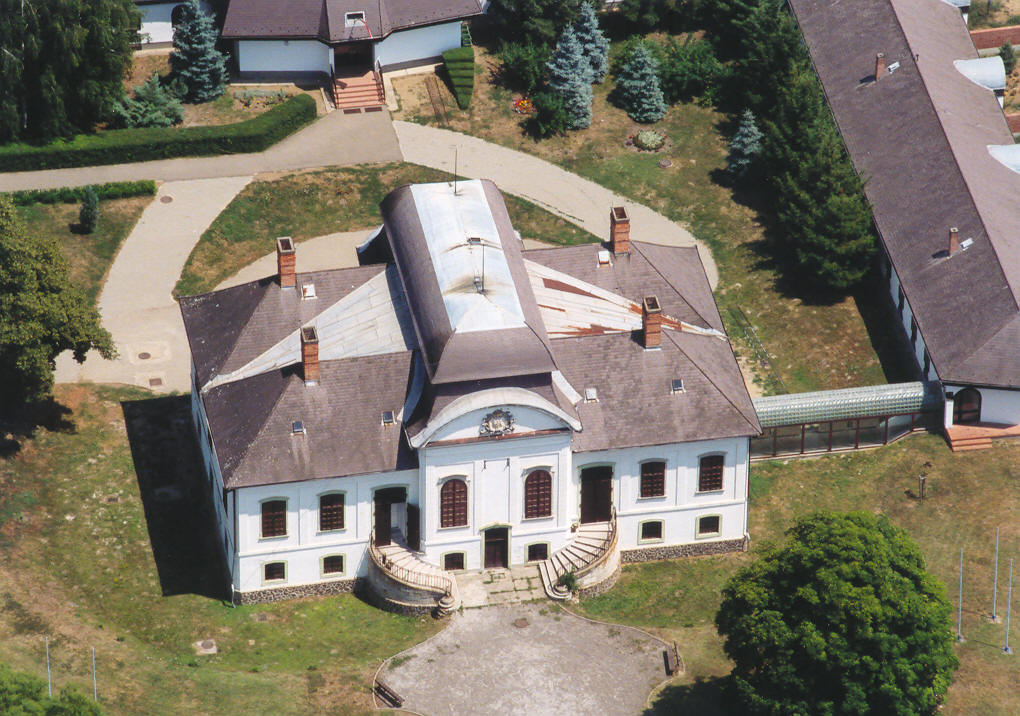 Palace - Tarnaméra - Hungary - Europe (Almássy Mansion)